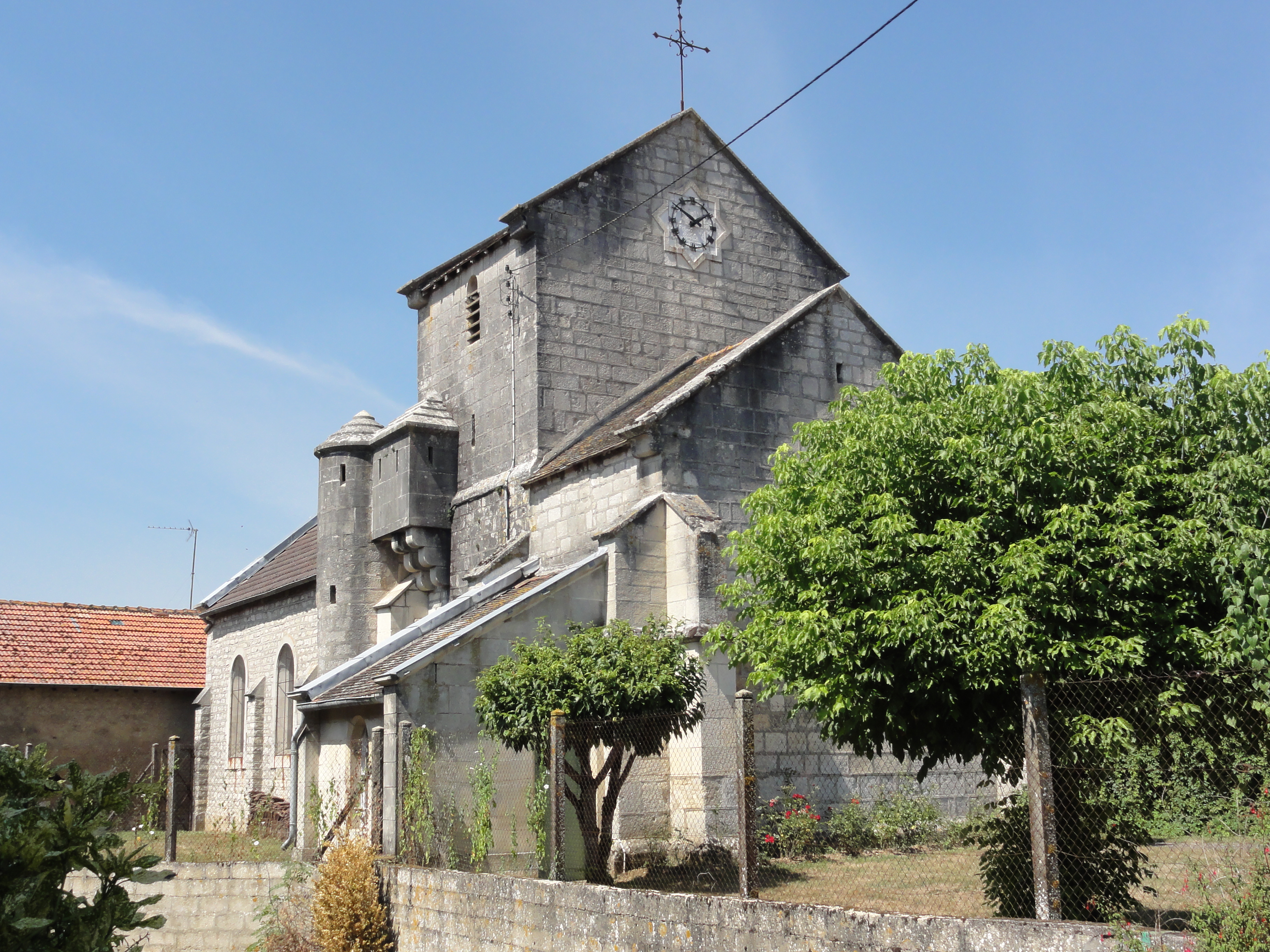 Bislée (Meuse) église